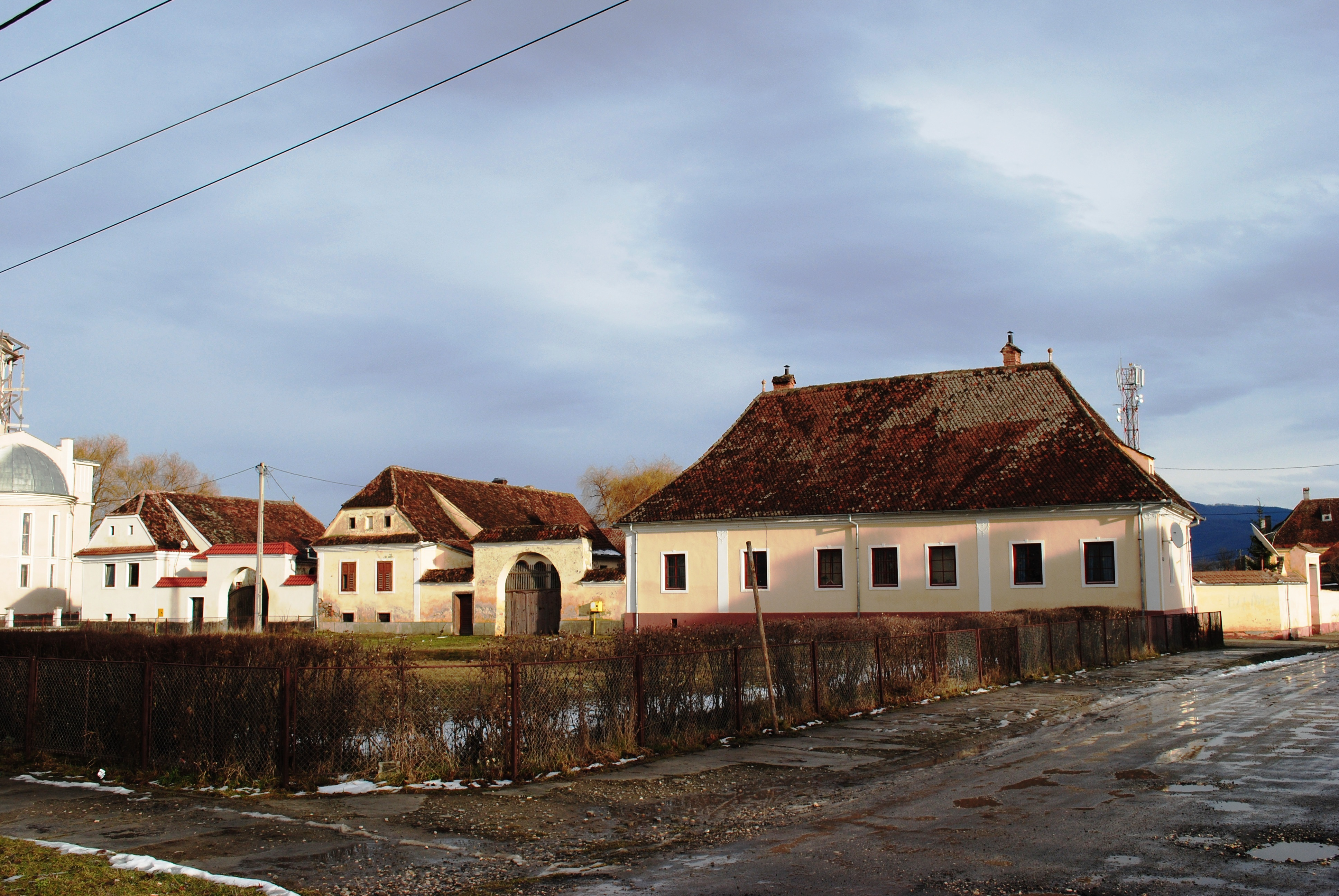 Situl rural Prejmer